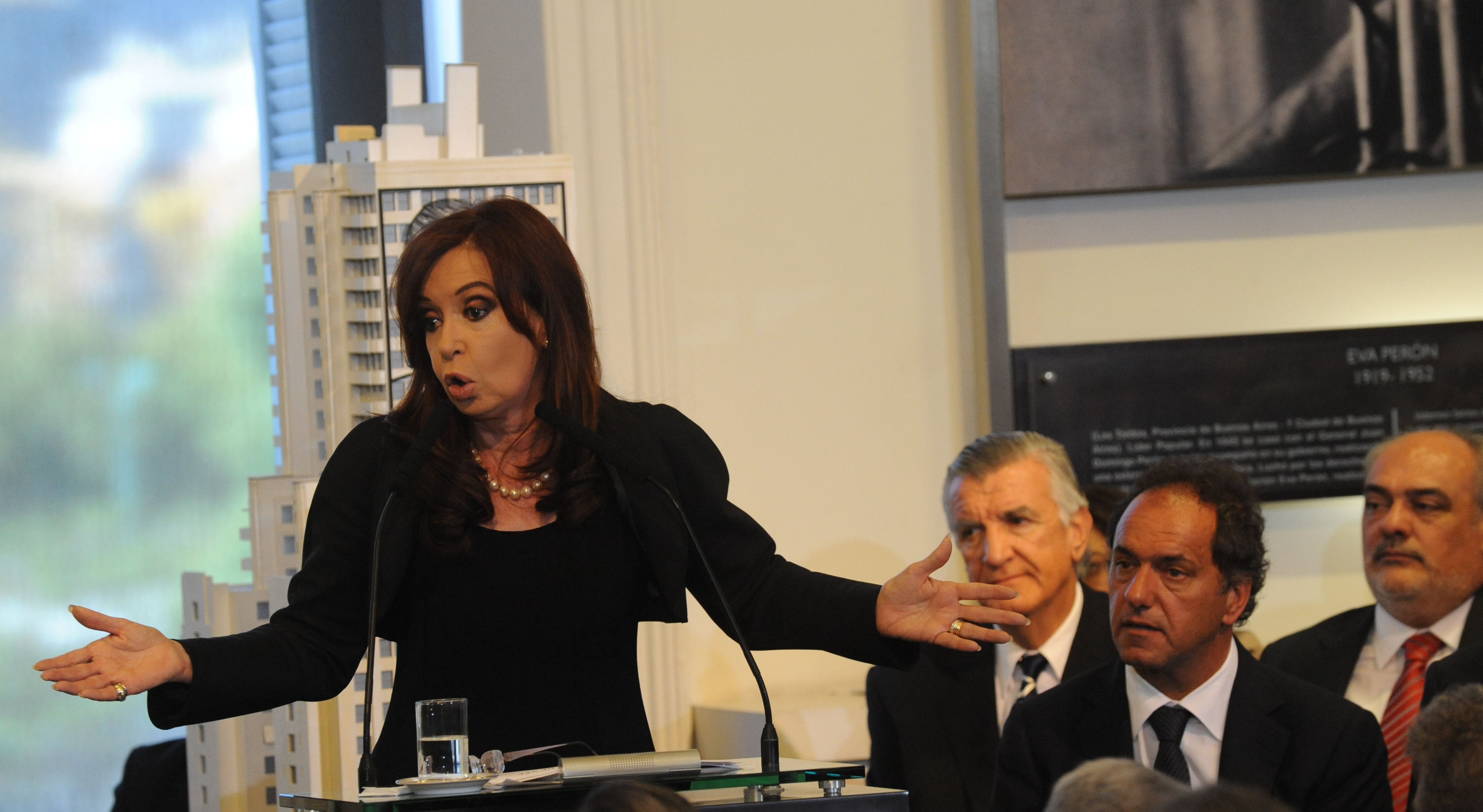 La presidenta Cristina Fernández hace uso de la palabra durante el acto en el Salón Mujeres Argentinas de la Casa de Gobierno. Detrás de ella, el gobernador de Buenos Aires, Daniel Scioli, el de San Juan, José Luis Gioja y el de Corrientes, Ricardo Colombi.